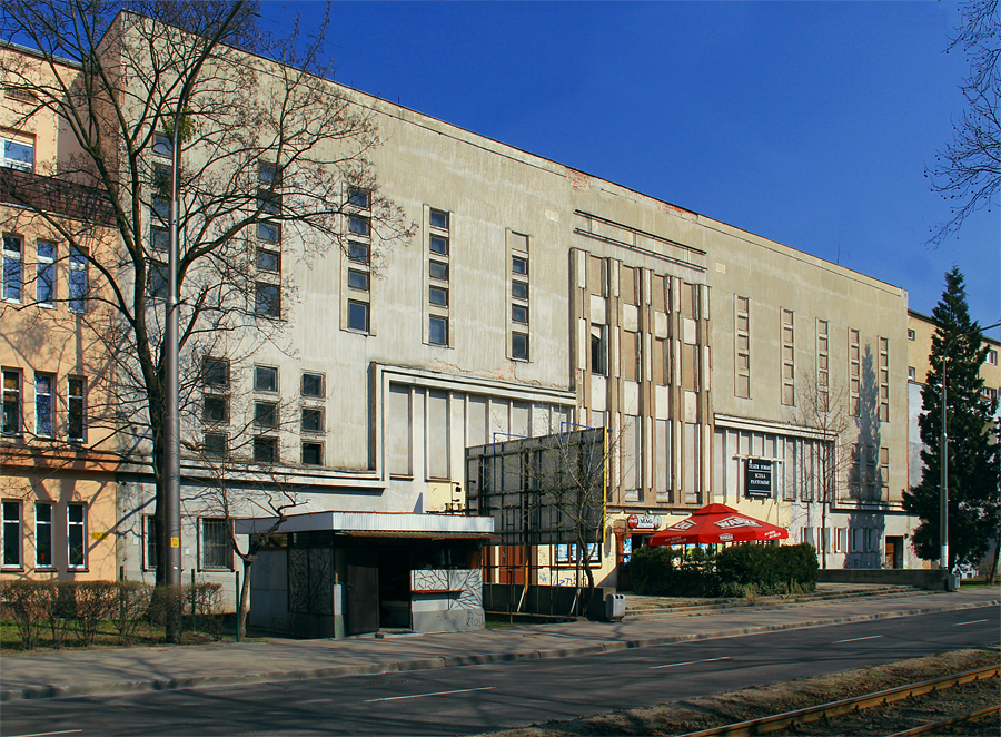 Dawne kino „Lwów” we Wrocławiu